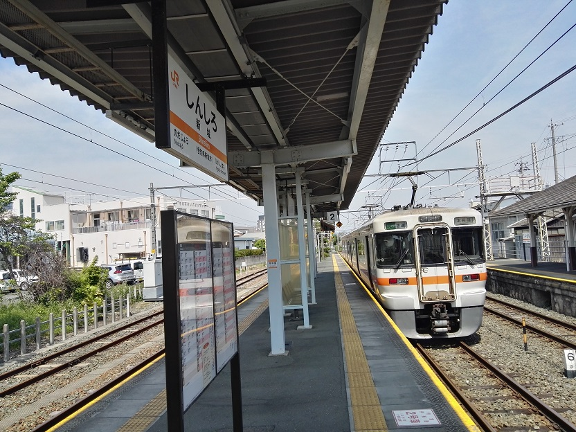 Shinshiro station platform